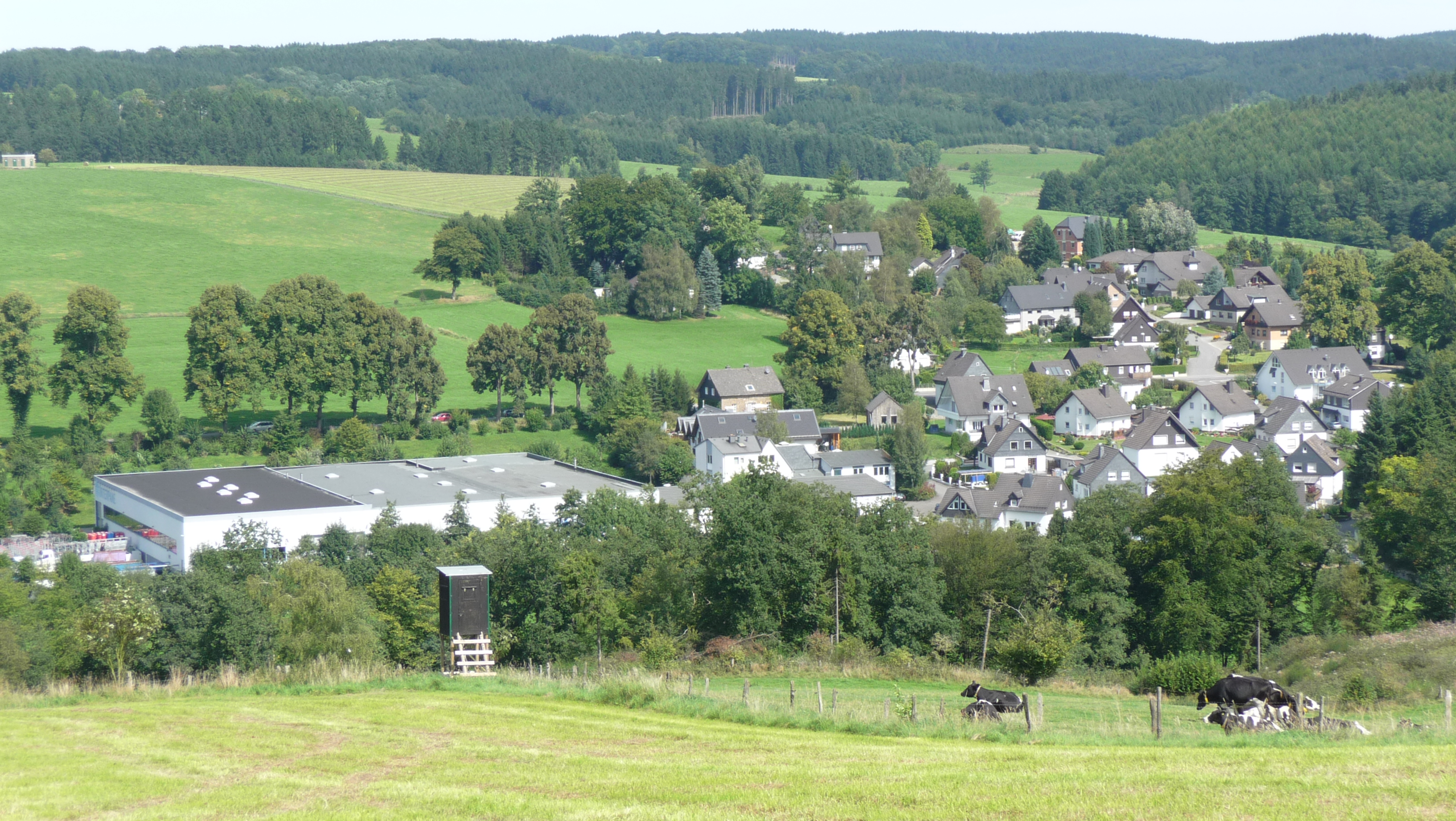 Böswipper von Altensturmberg aus gesehen, Wipperfürth